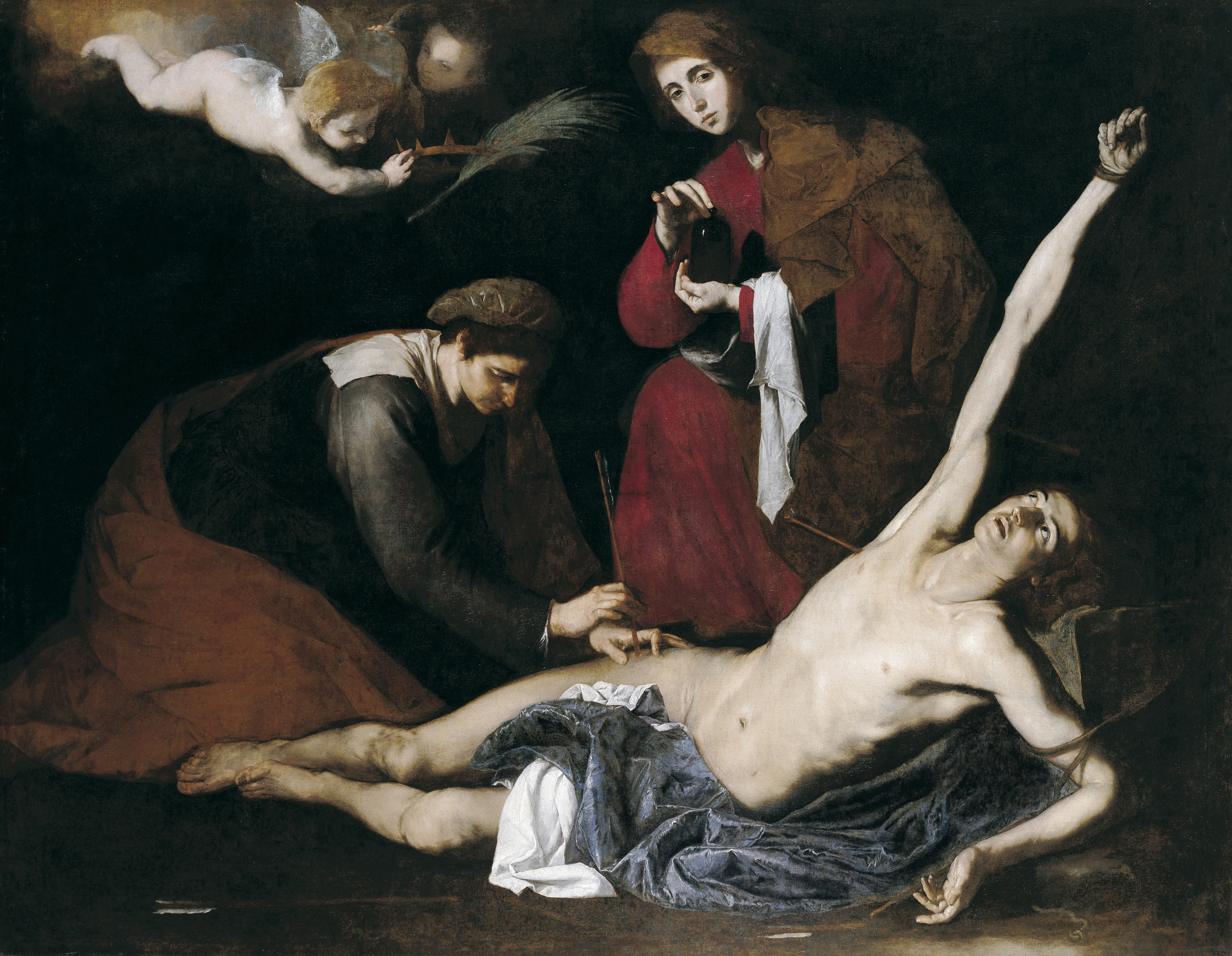 El lienzo muestra al mártir cristiano San Sebastián, que moriría asaeteado en el año 288 d. C. por su condición de cristiano, siendo atendido y curado por las santas mujeres Irene y Lucila.